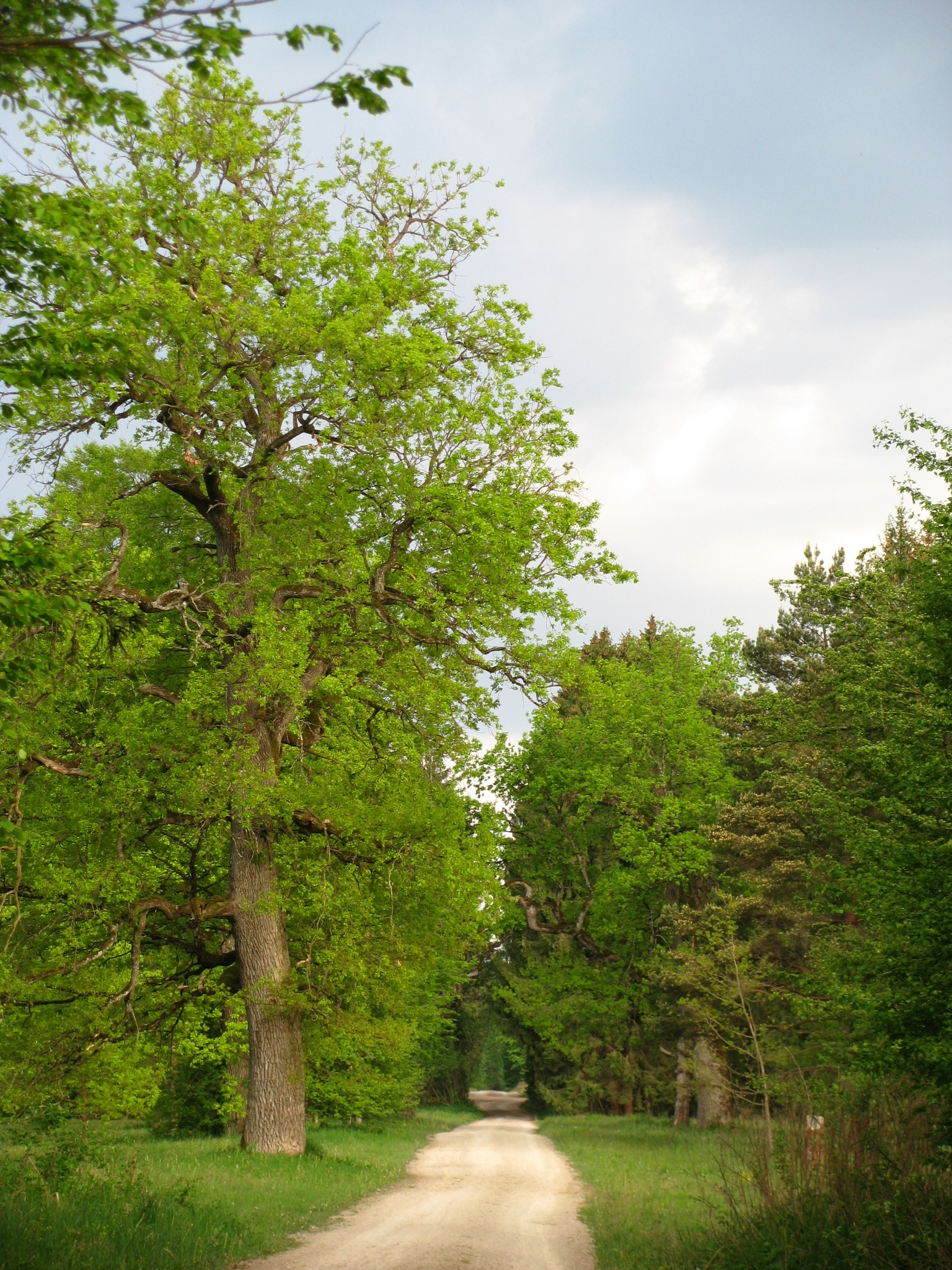 Die Römerstraße (Via Julia) im Forstenrieder Park im Bereich des Eichelgartens.